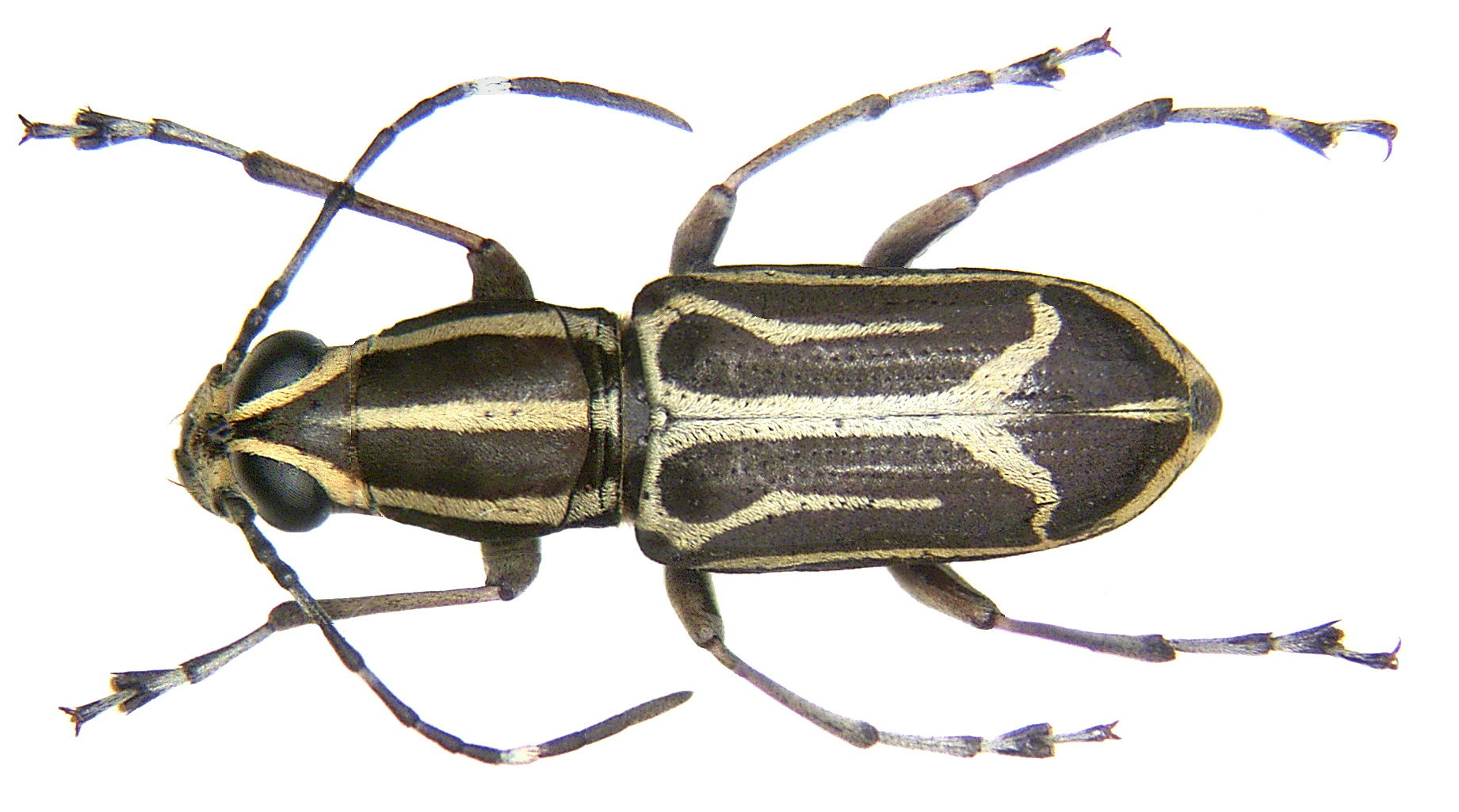 Familie: Anthribidae Grösse: 18 mm Fundort: Indonesien, Molukken, Bacan, Labuha leg. A.Skale, 2006; det. R.Frieser Foto: U.Schmidt, 2006